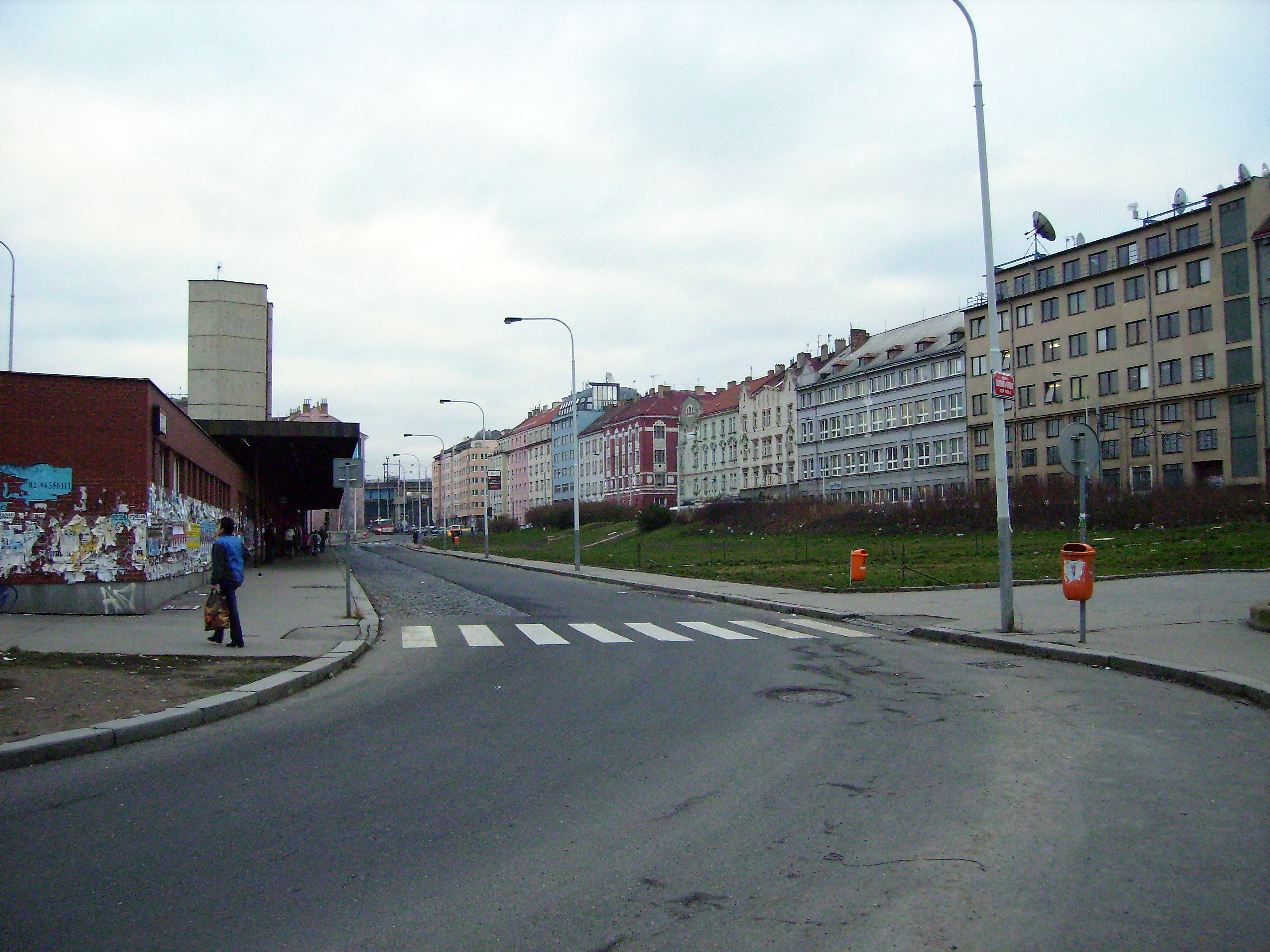 Náměstí Bohumila Hrabala v Praze 8 na Palmovce.